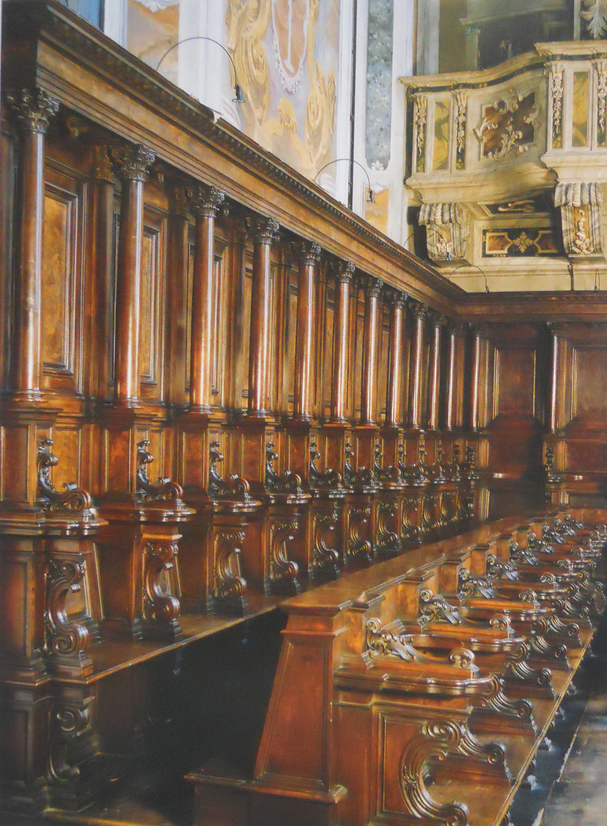 San Faustino maggiore (Brescia), gli stalli del coro